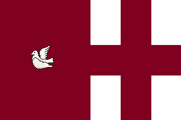 Bandera Municipal de Palomeque (Toledo)